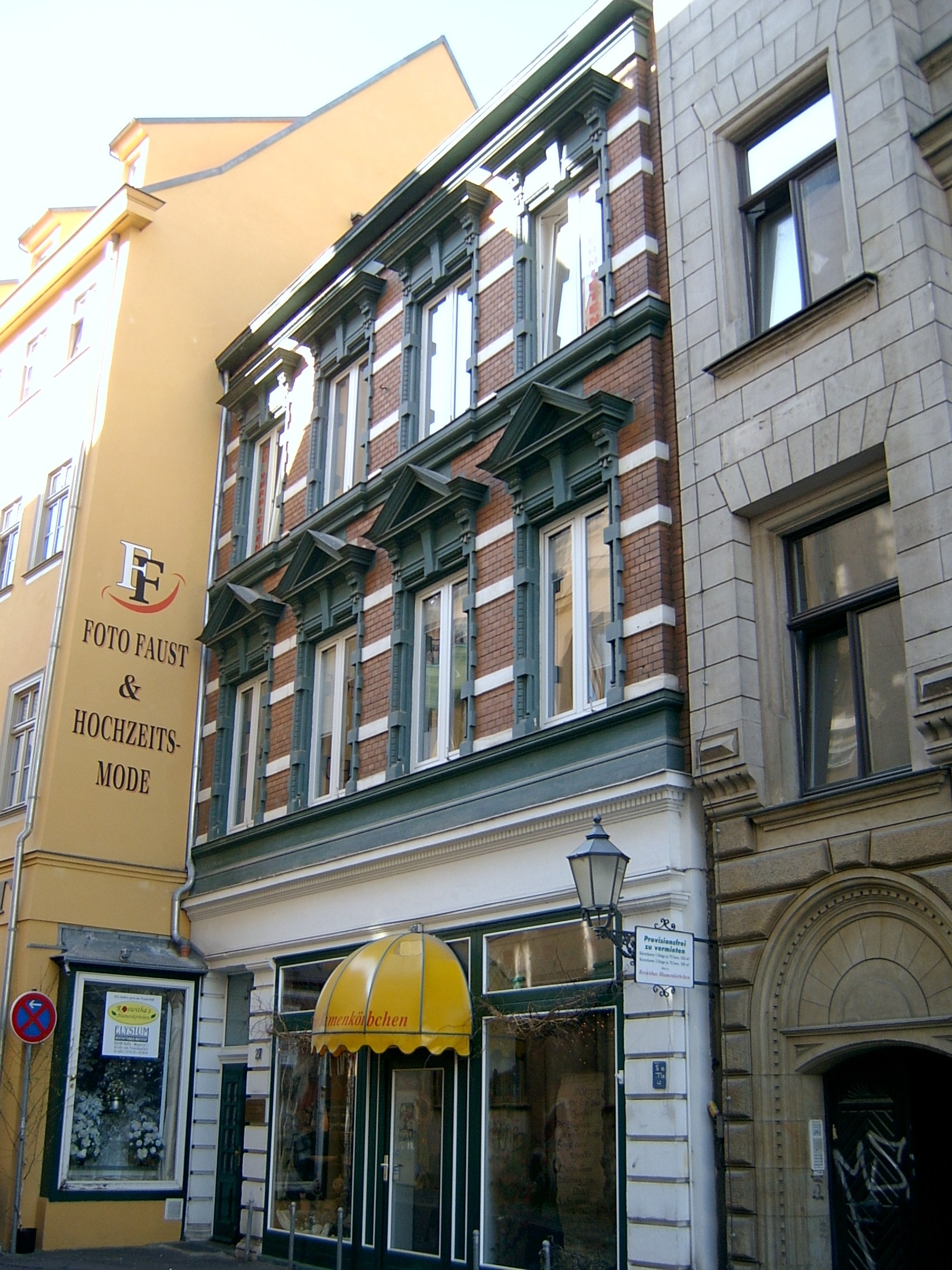 Große Märkerstraße 27 in Halle (Saale) - Blick aus Richtung Marktplatz